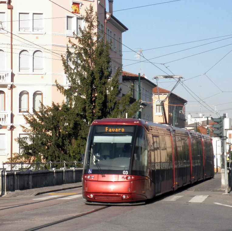 Convoglio in via Colombo.